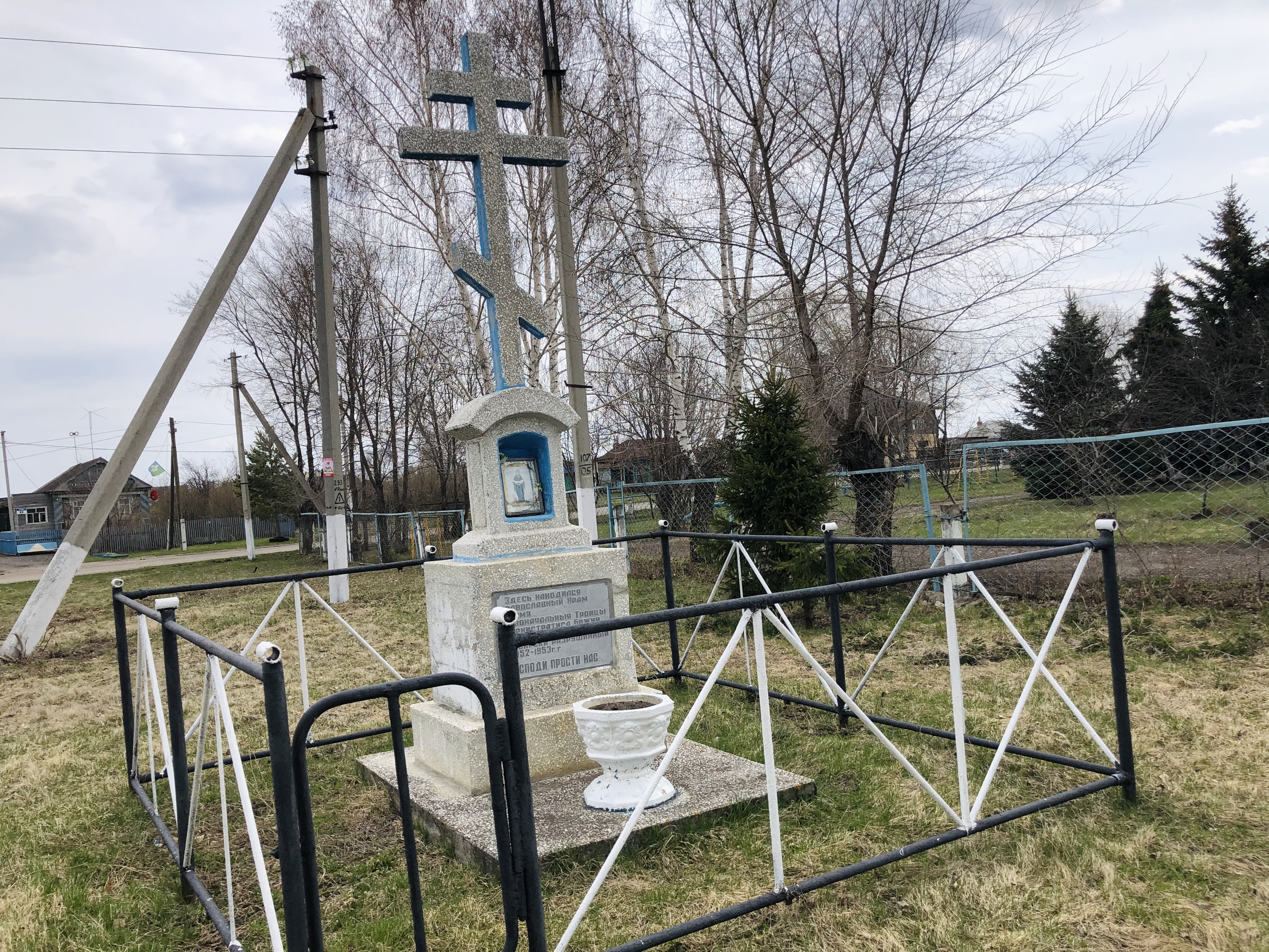 с. Крестниково, памятный крест Храма Живоначальной Троицы